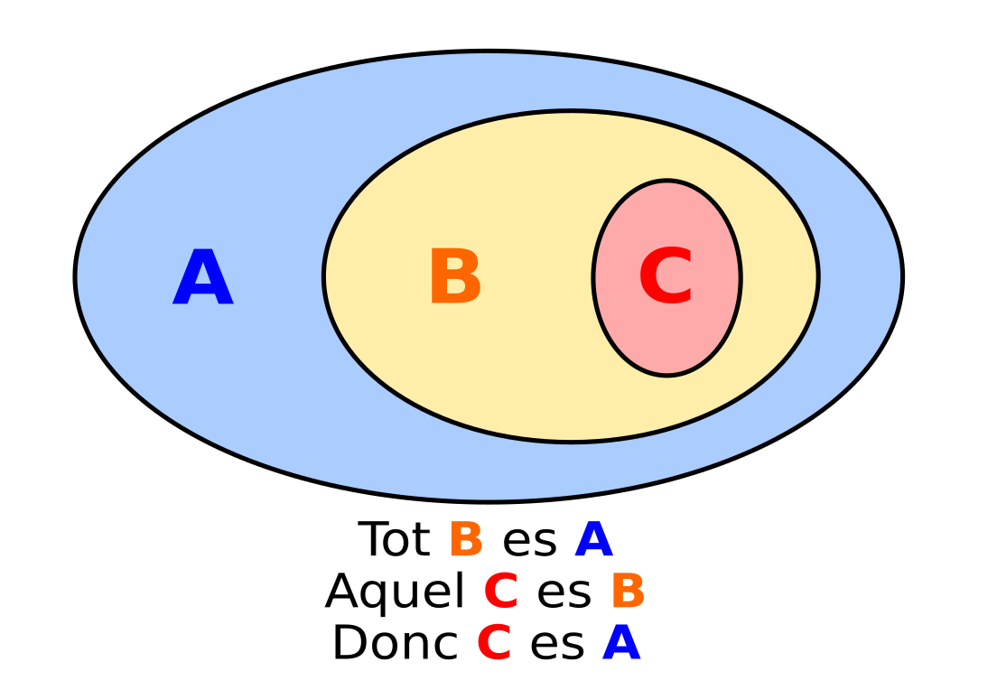 Esquèma generau d'un sillogisme.